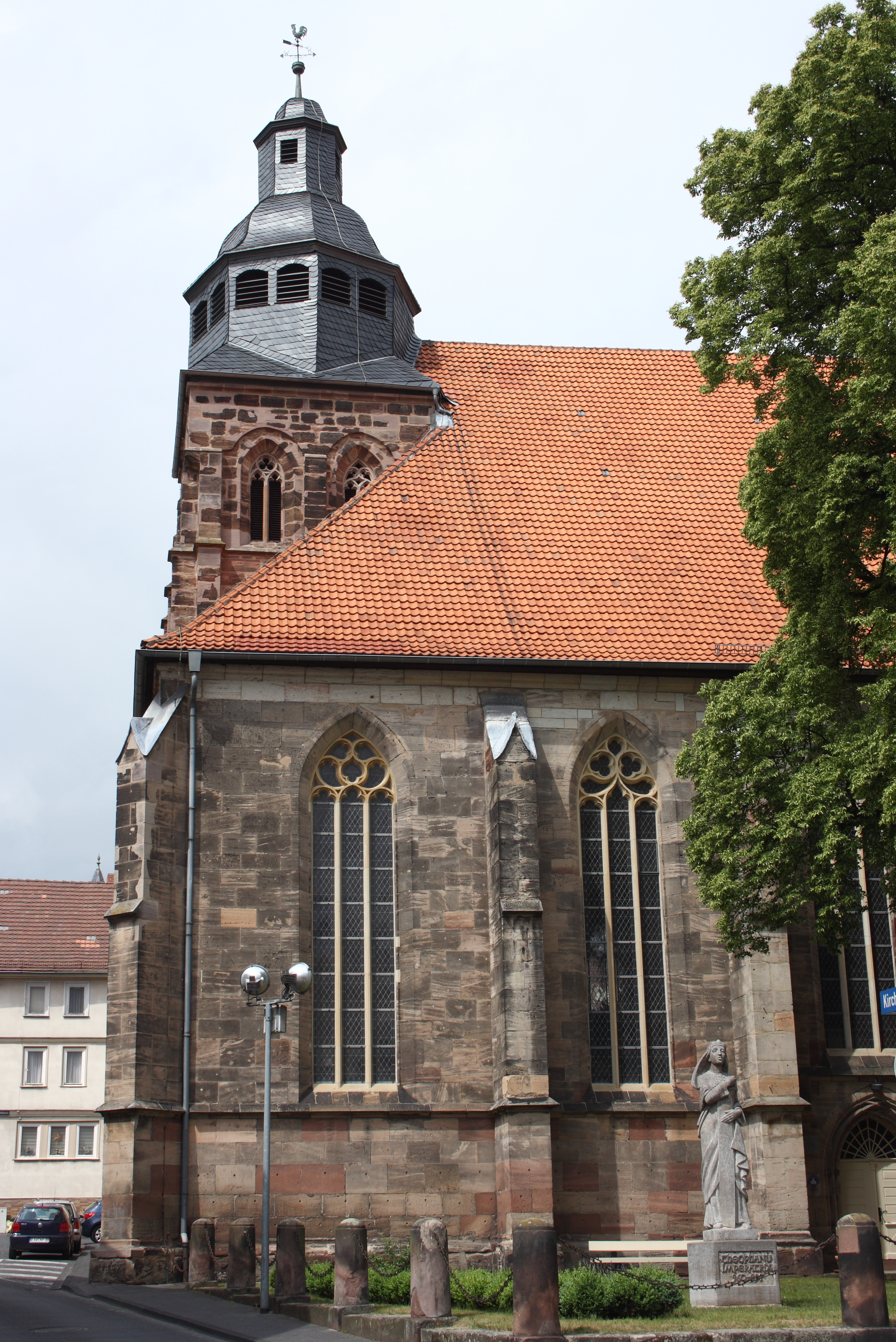 Evangelische Marktkirche St. Dionys in Eschwege im Werra-Meißner-Kreis (Hessen)